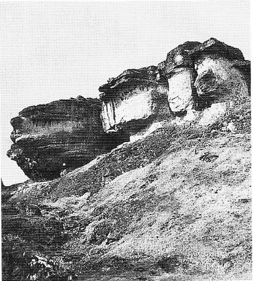 Die damals waldfreie Felsformation "Klinge" bei Großziegenfeld.